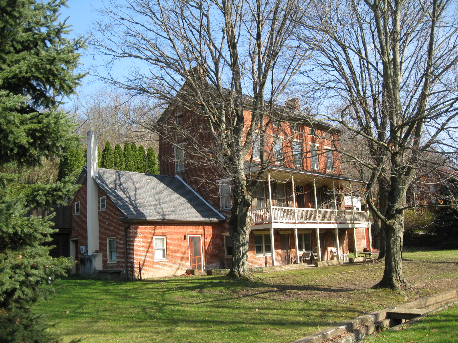 Railroad, Pennsylvania